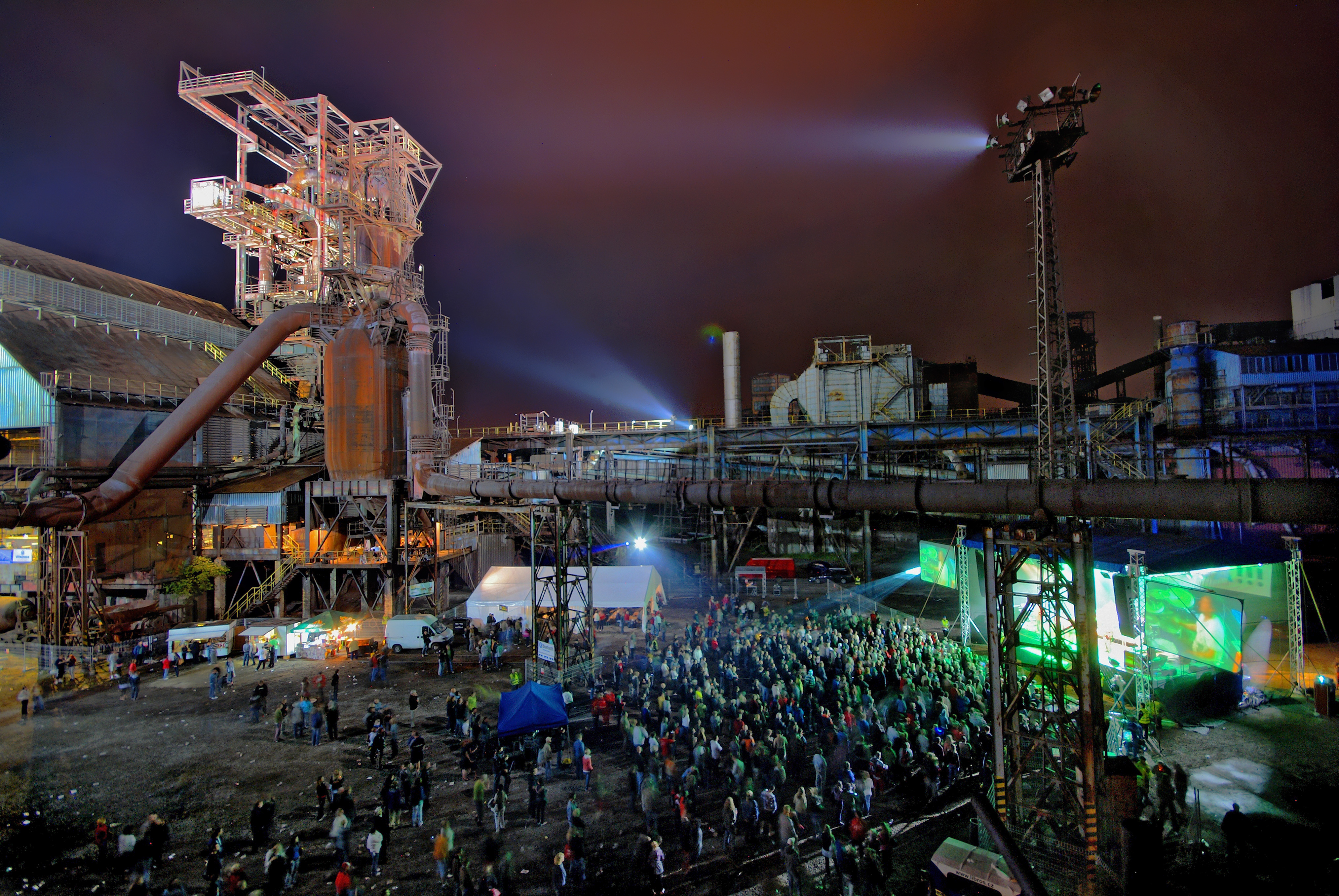 DOV Ostrava